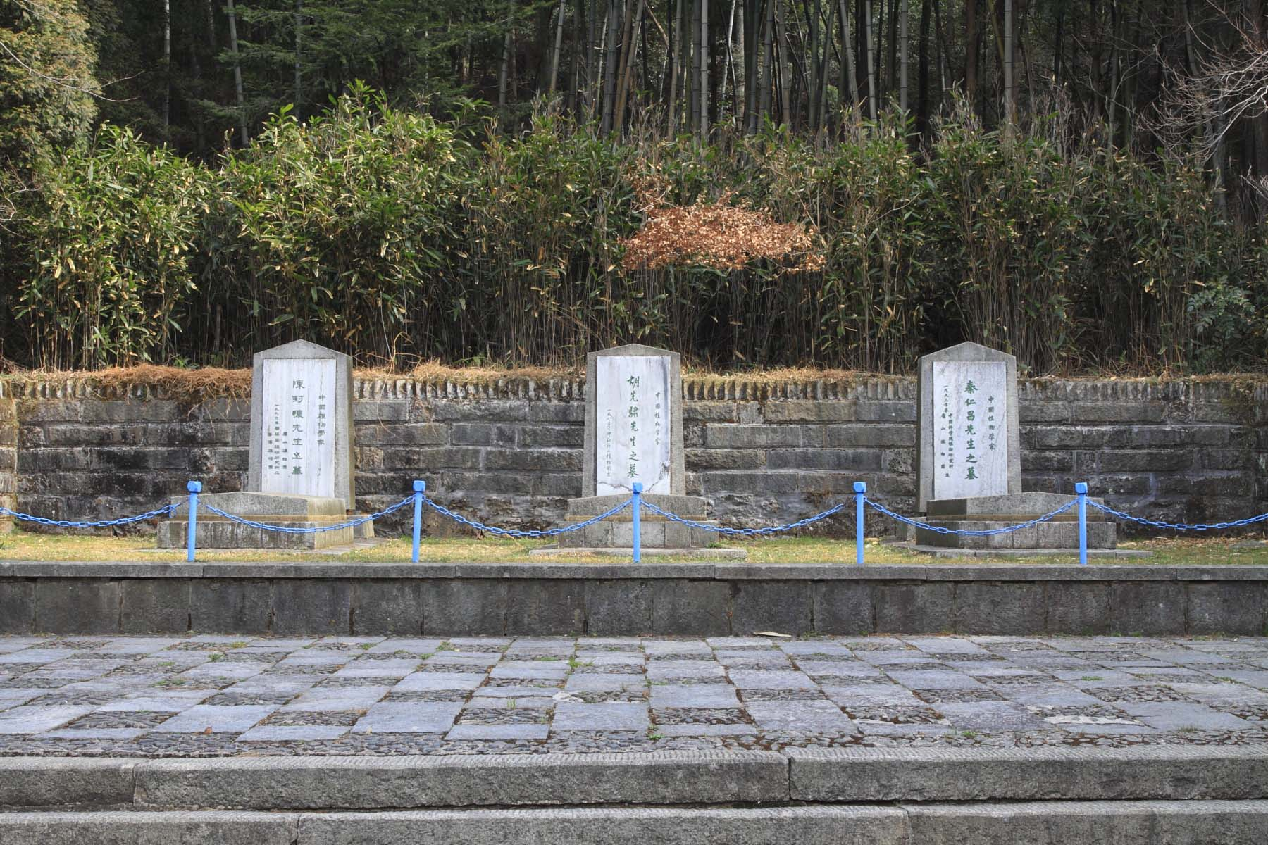 江西庐山三老墓，庐山风景名胜区文物保护单位